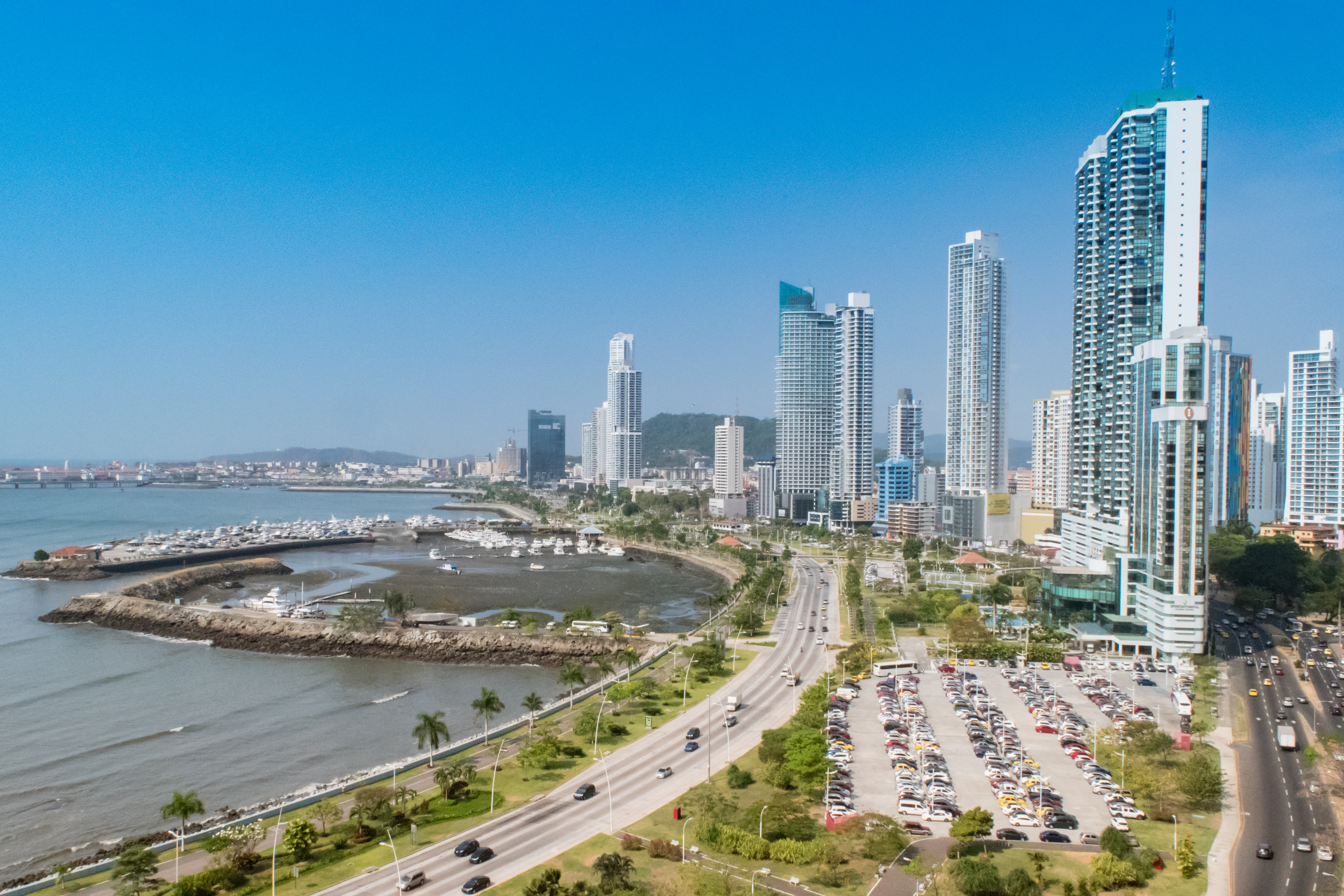 Panama